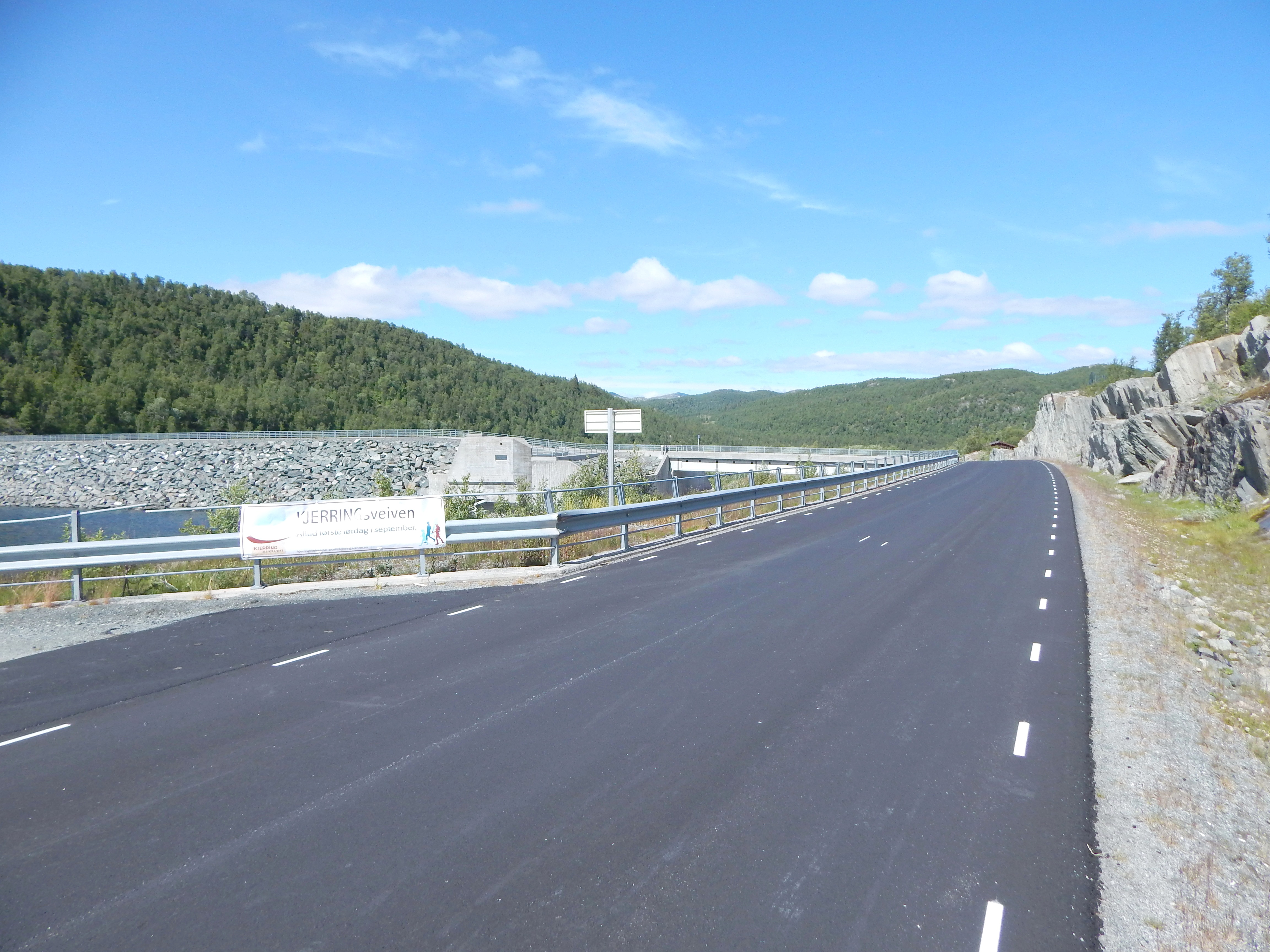 Fylkesvei 37 ved Møsvassdammen